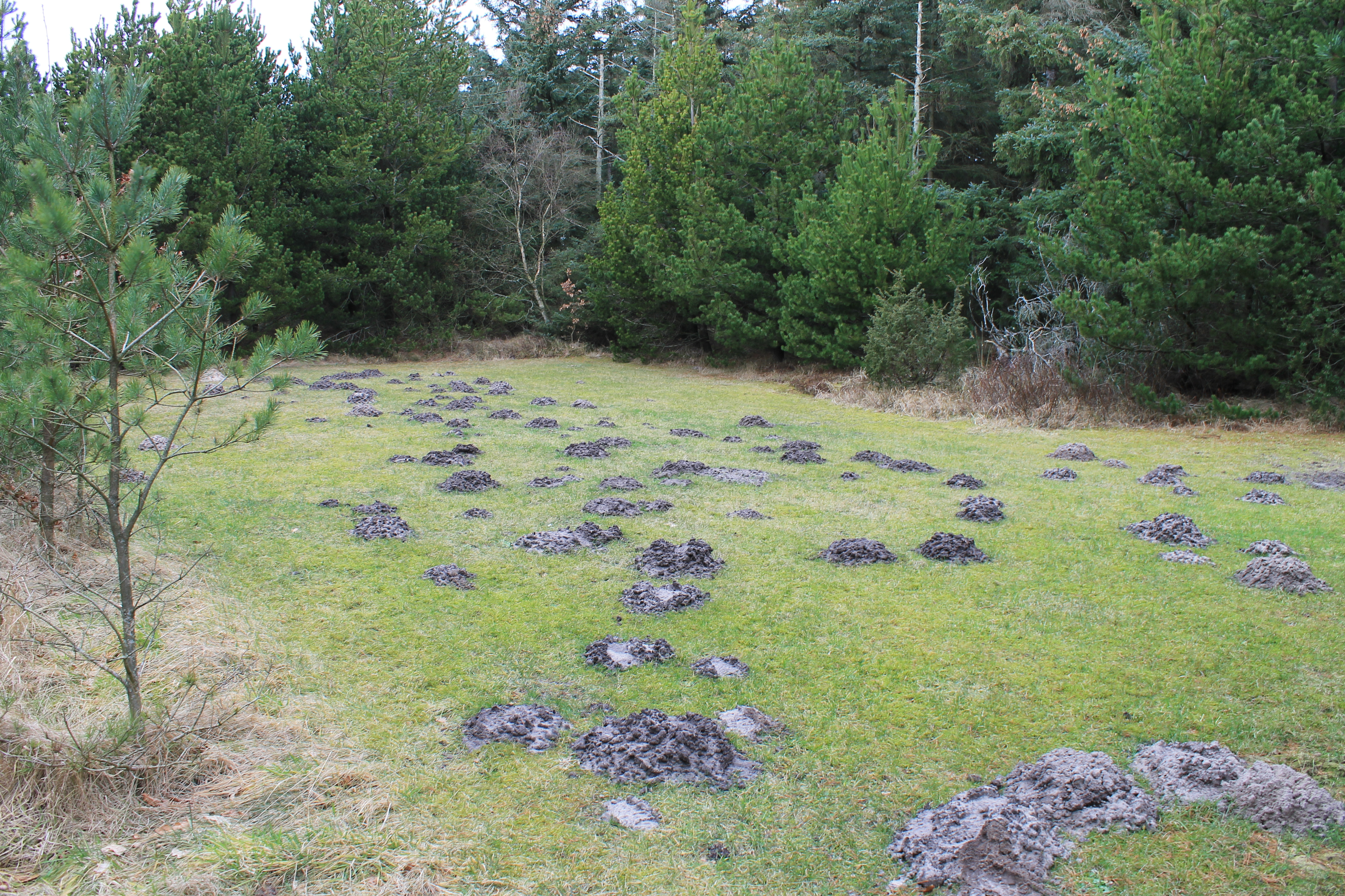 Uggerby Klitplantage. EU-habitatområde nr. 5